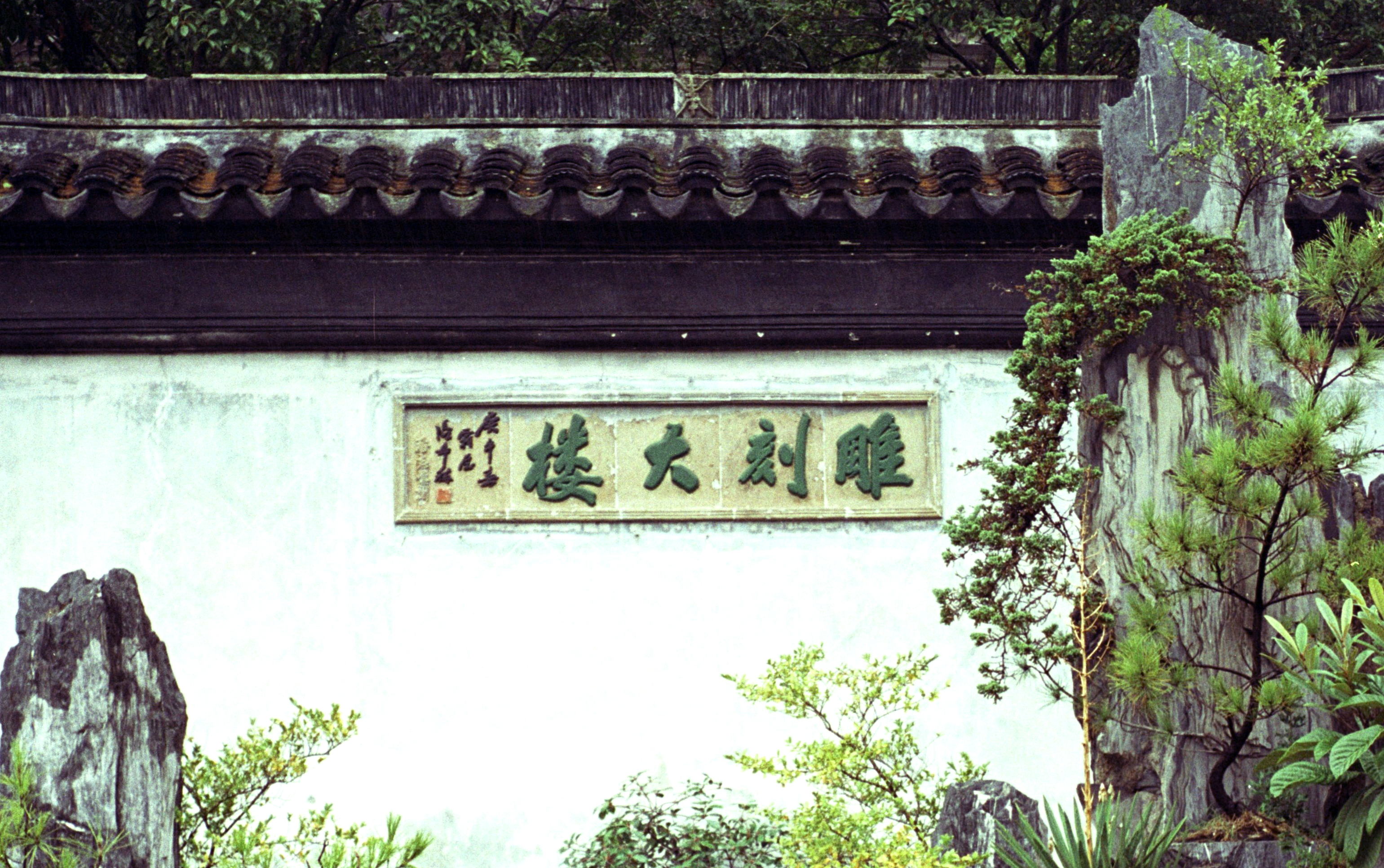 雕刻大楼